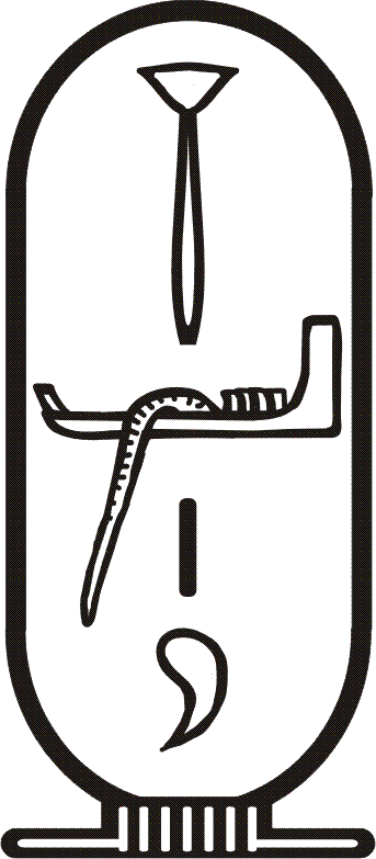 Kartuschenname des Pharao Wadjenes in der Sakkara-Liste